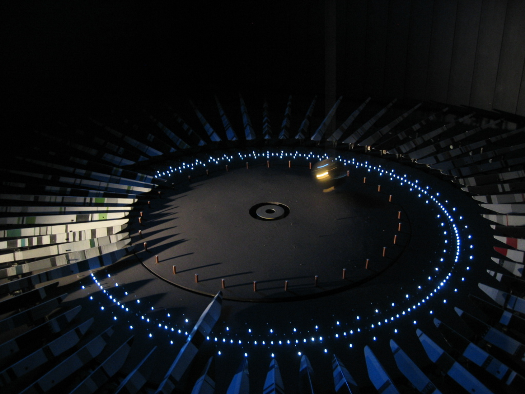 Musée du Temps de Besançon - Franche Comté - France